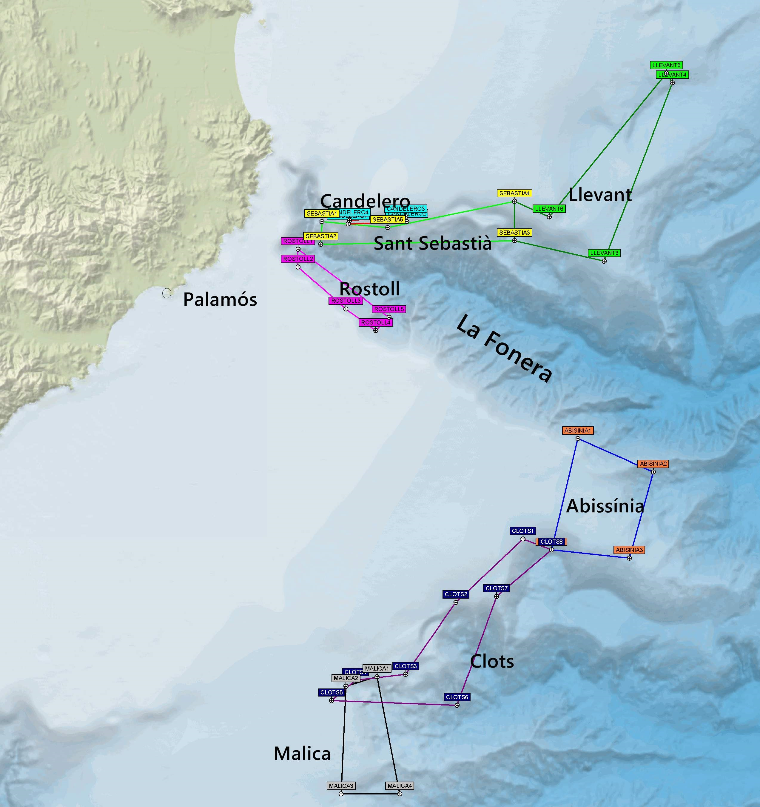 Àmbit territorial d'actuació del pla de gestió de la gamba de Palamós